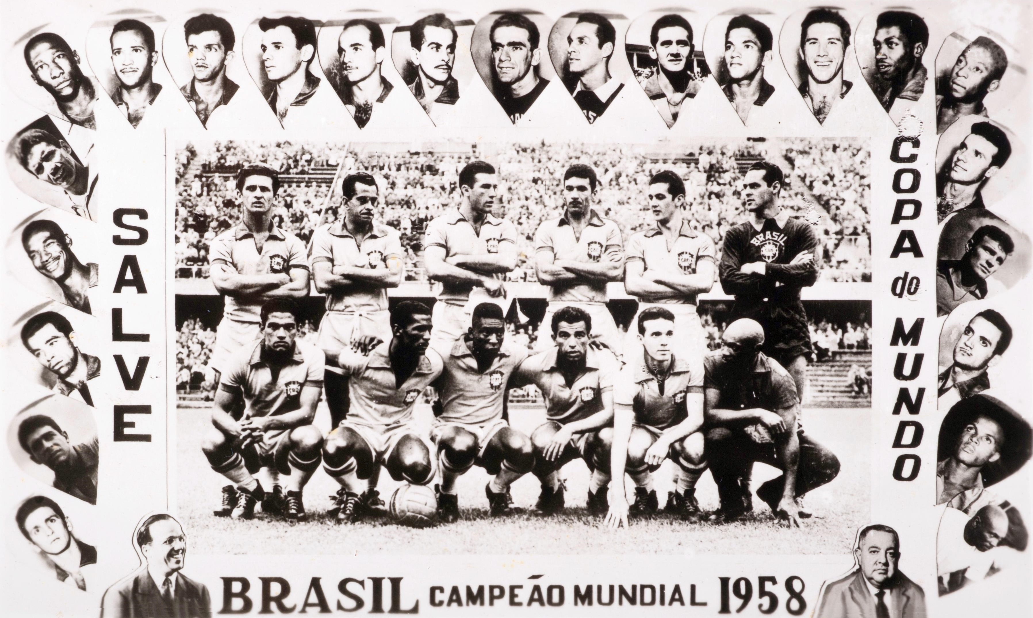 Obra que integra o acervo do Museu Paulista da USP. Coleção Werner Haberkorn - CHW